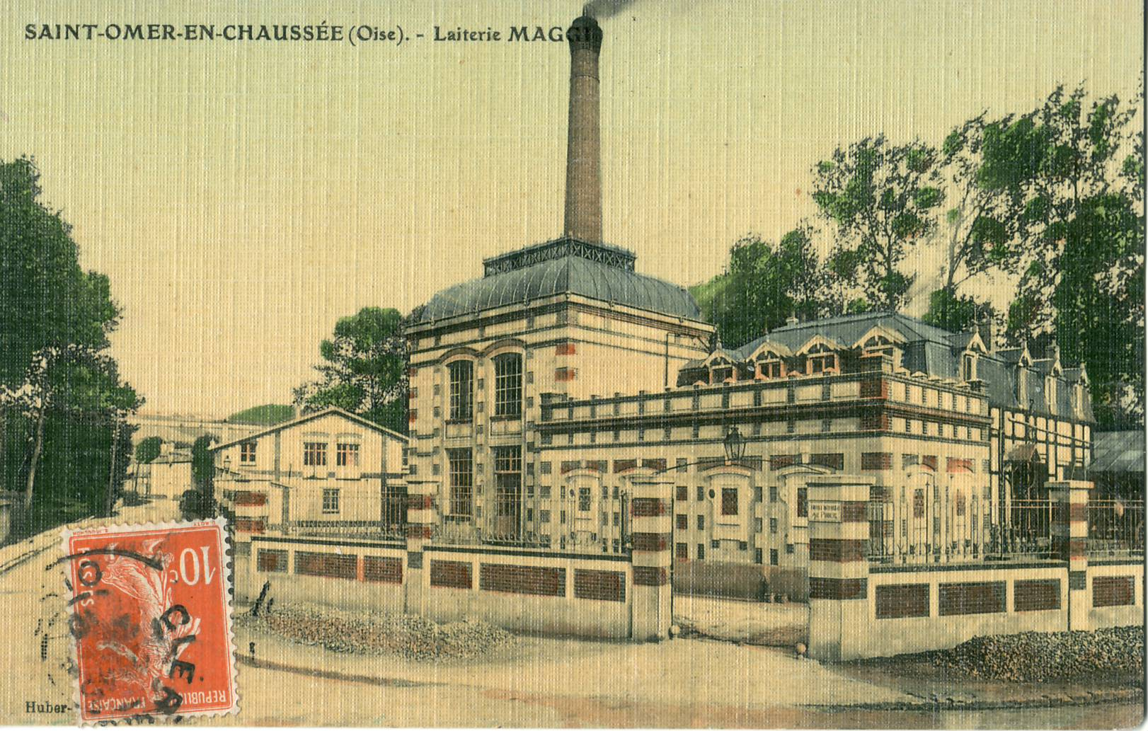 Cartpe postale ancienne éditée par HuberSaint-Omer-en-Chaussée : la laiterie Maggi